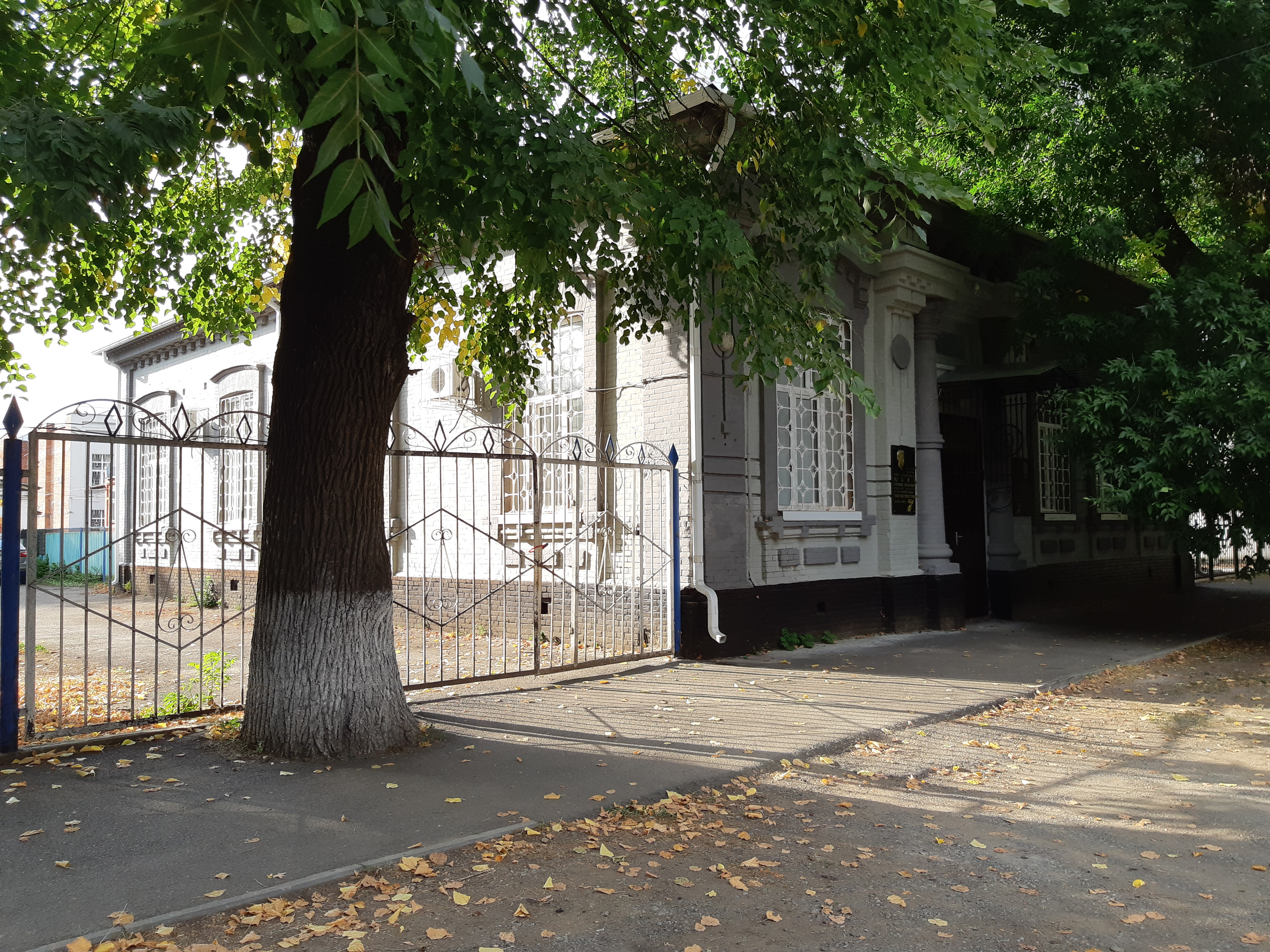 Здание, где в детском доме воспитывались герои Советского союза Н.Л. Юдин и П.И. Степаненко: улица Ленина, 13, Майкоп, Адыгея